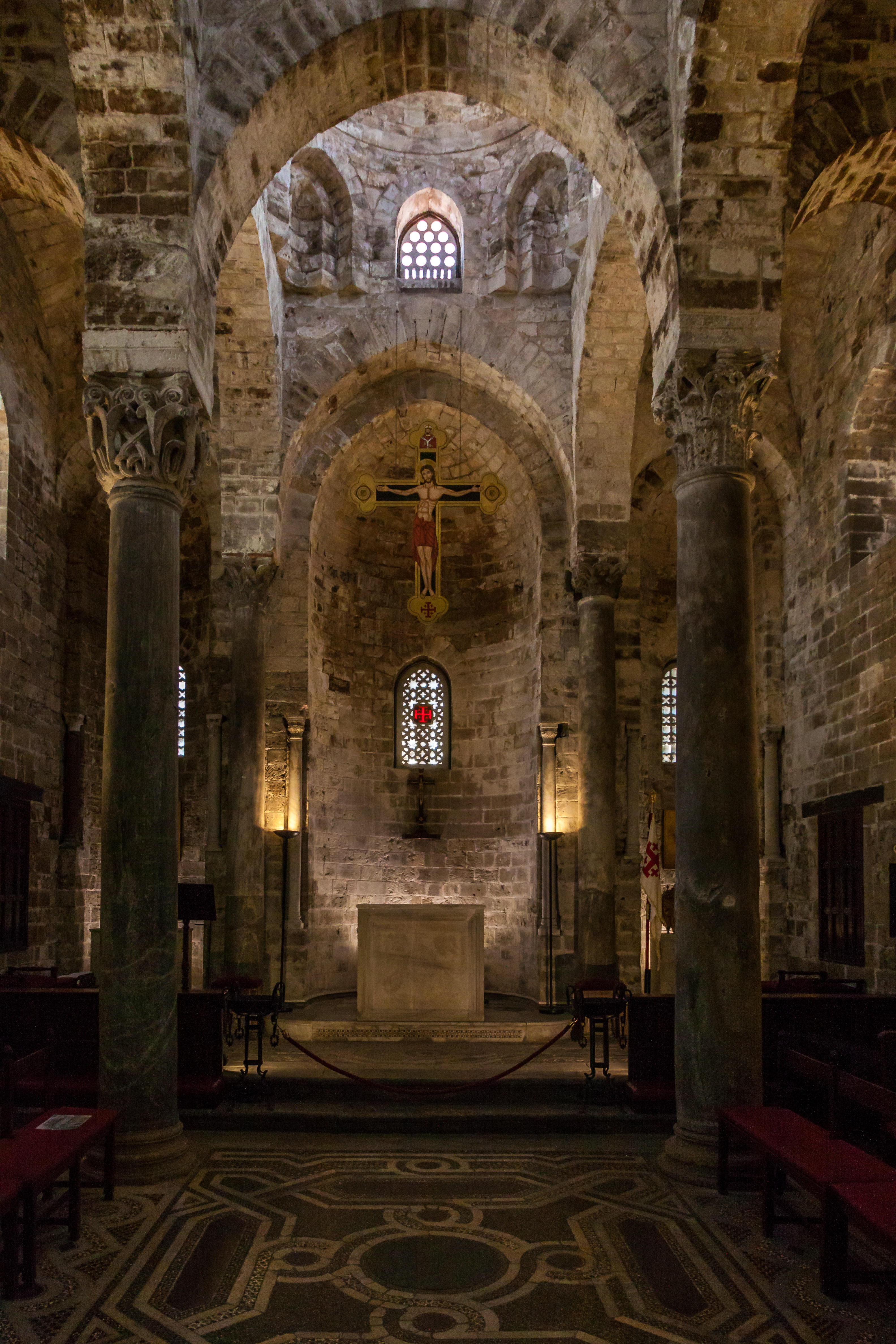 Kirche San Cataldo in Palermo.